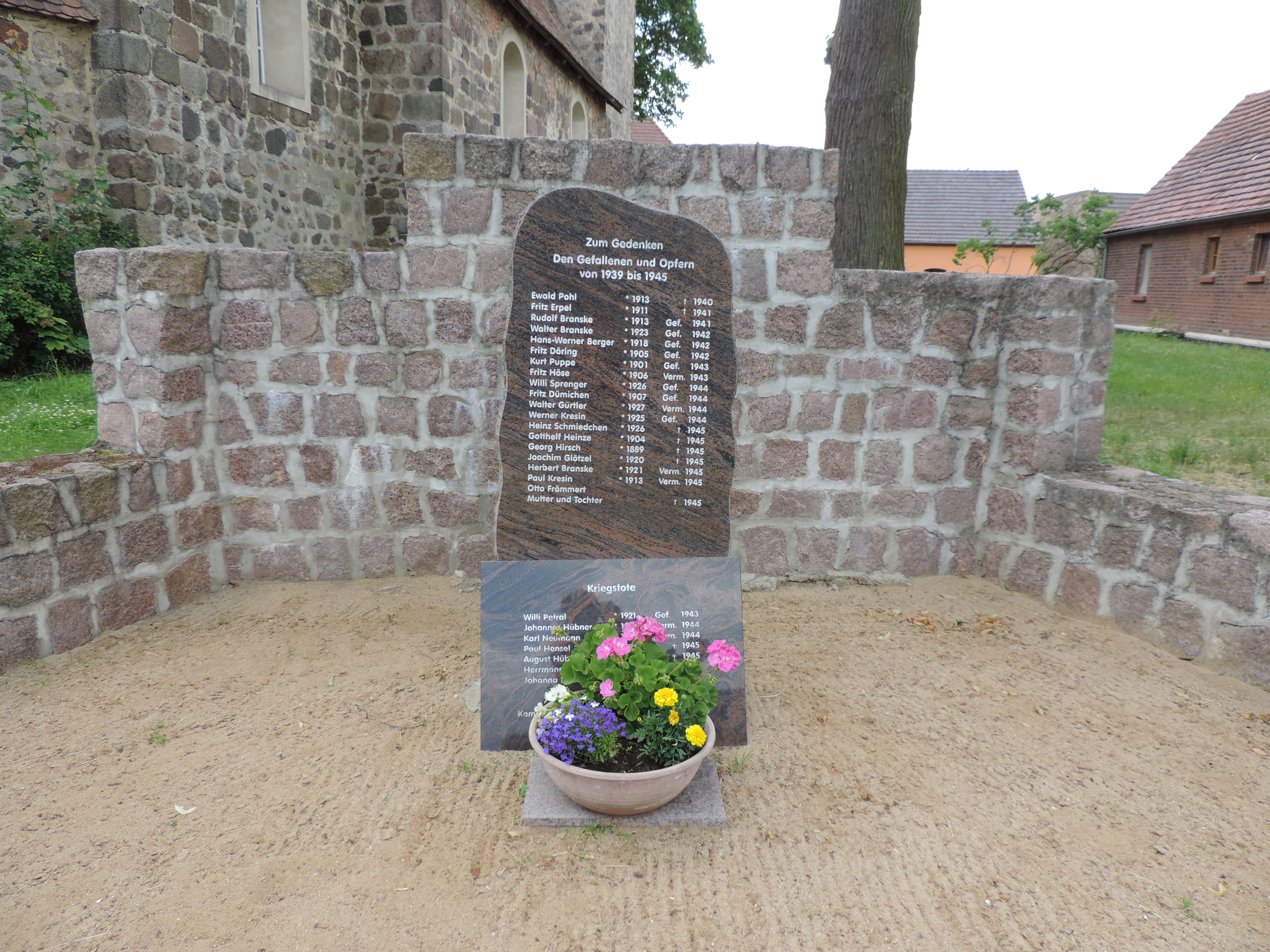 Denkmal 2.Weltkrieg - Gebersdorf